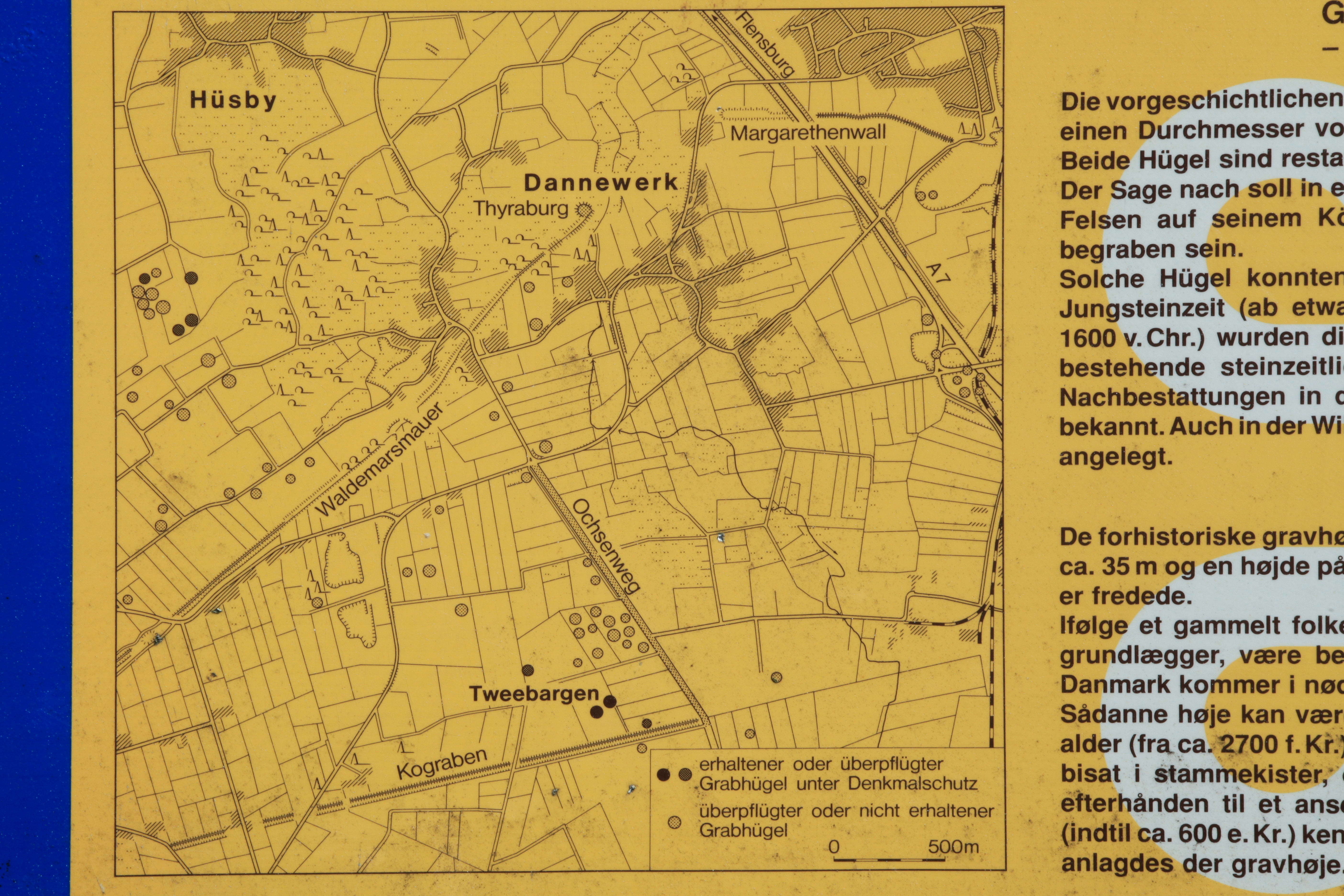 Grabhügel Tweebargen, nahe Kograben und Ochsenweg in Dannewerk